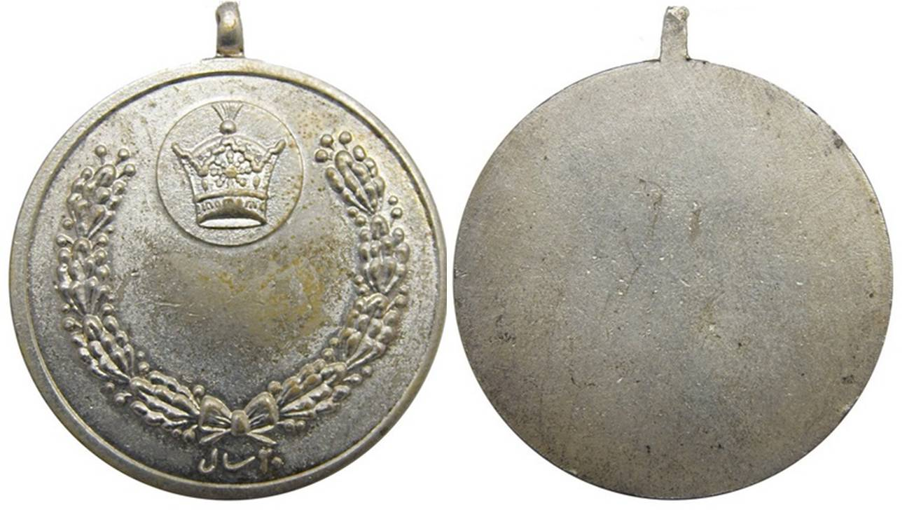 نشان 20 سال خدمت محمدرضا شاه